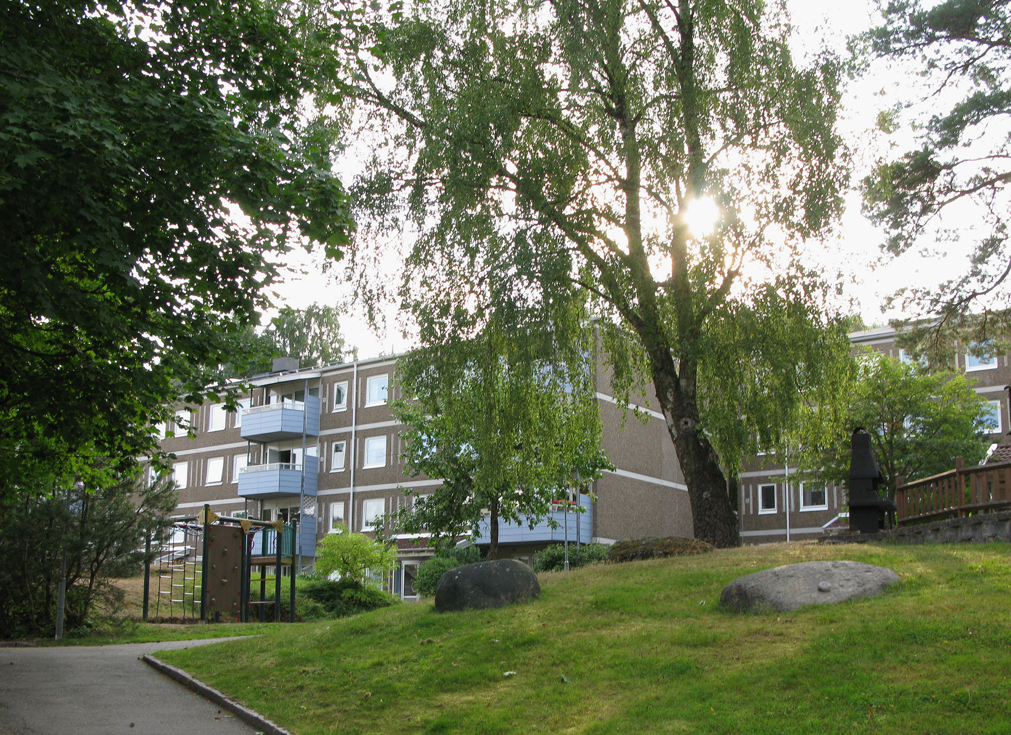 Housing estate at Kvadrantgatan, Bergsjön, Göteborg